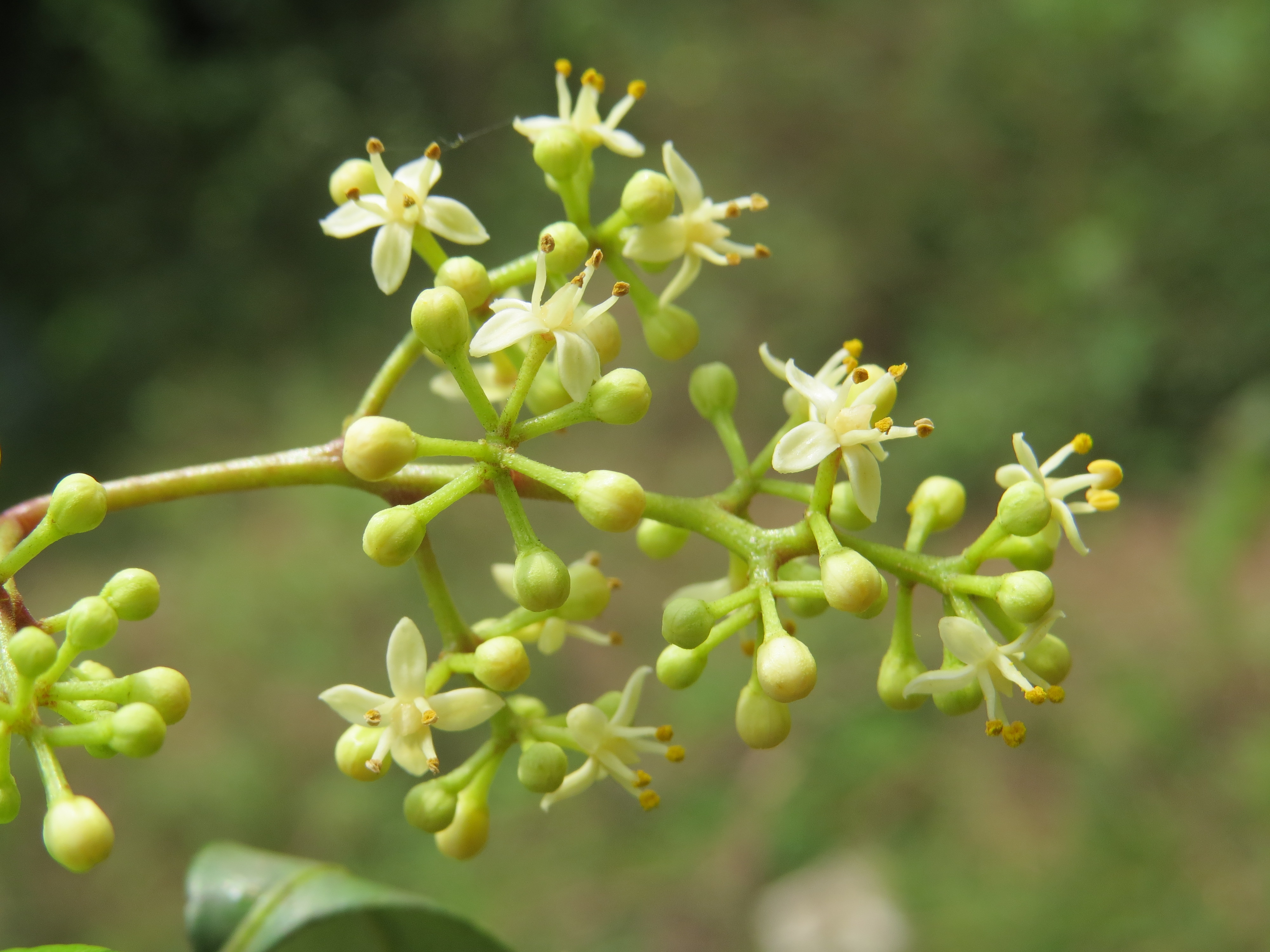 Photos by Vinayaraj